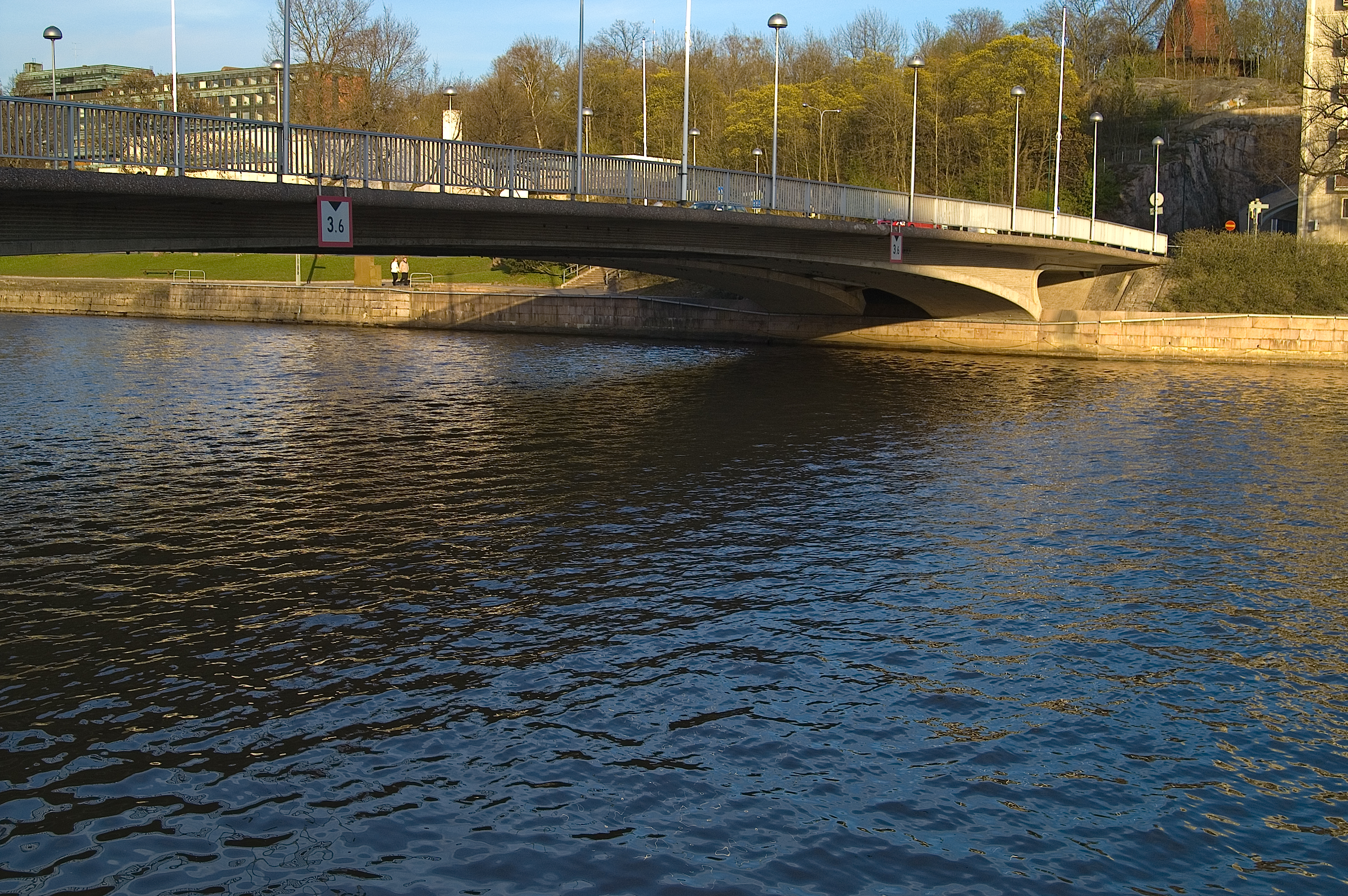 Myllysilta, toiseksi alin Aurajoen ylittävä silta.myllysilta